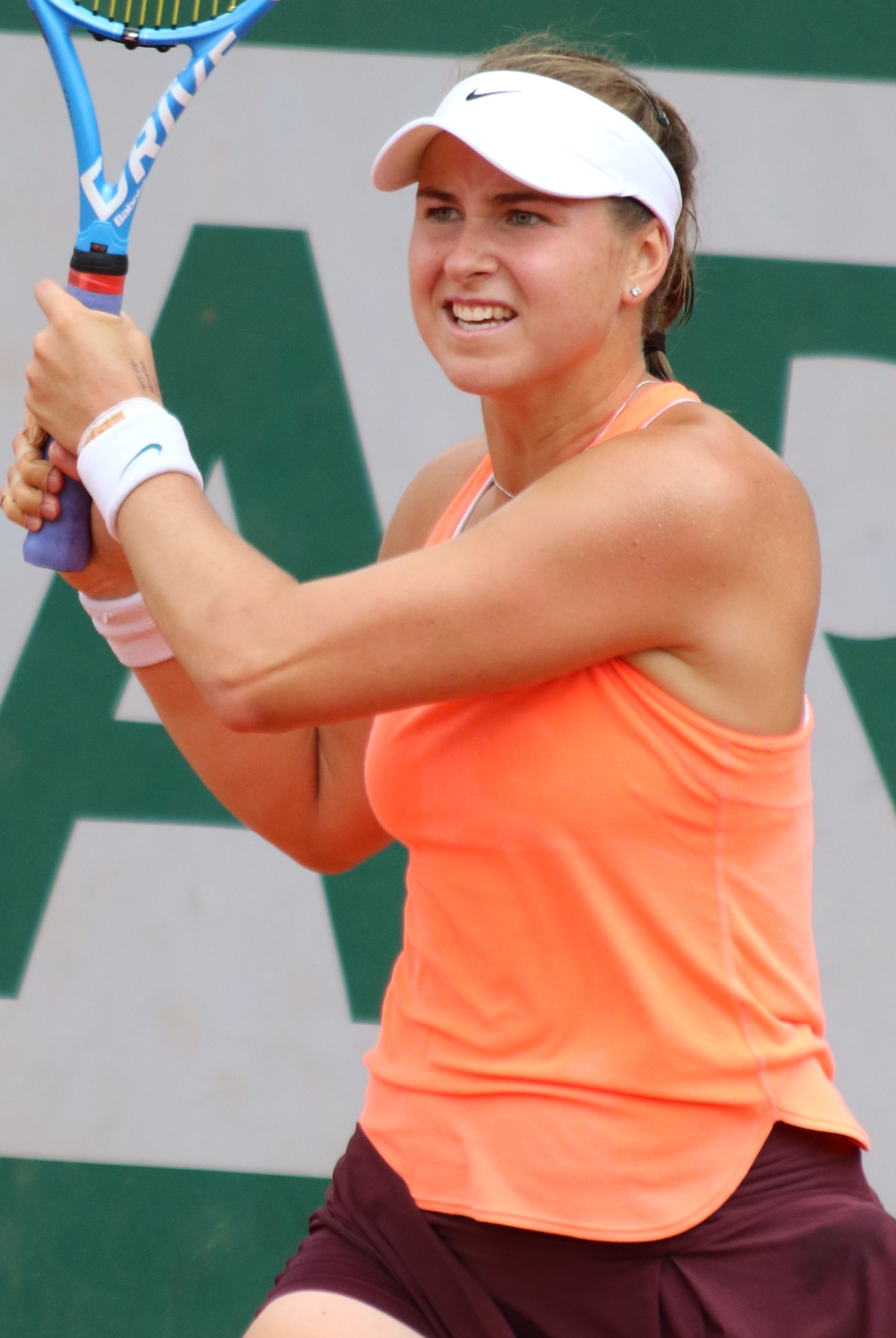 Peterson RG18 (34)